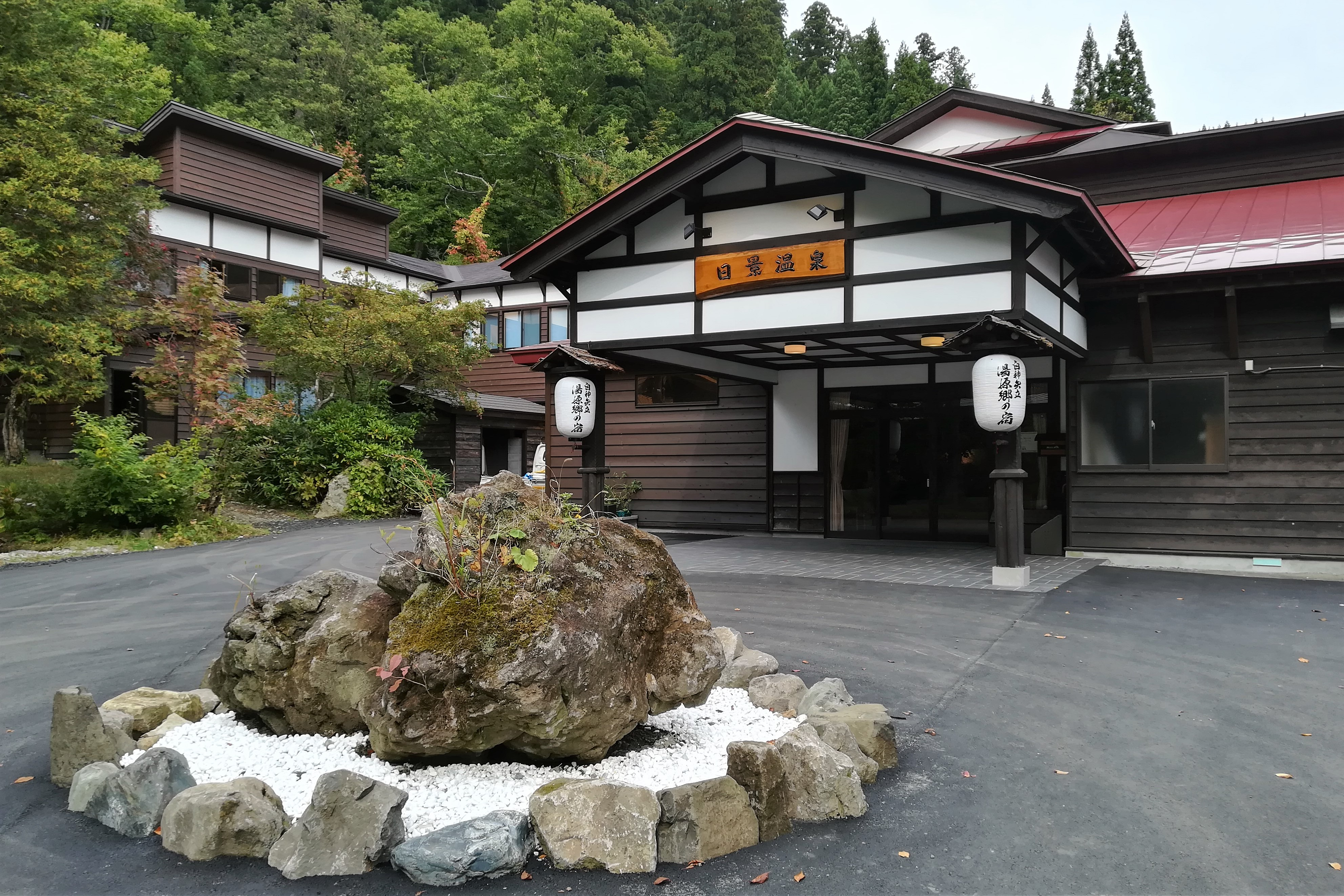 日景温泉 （秋田県大館市）